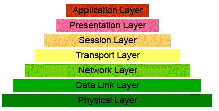 7 Nivelet OSI